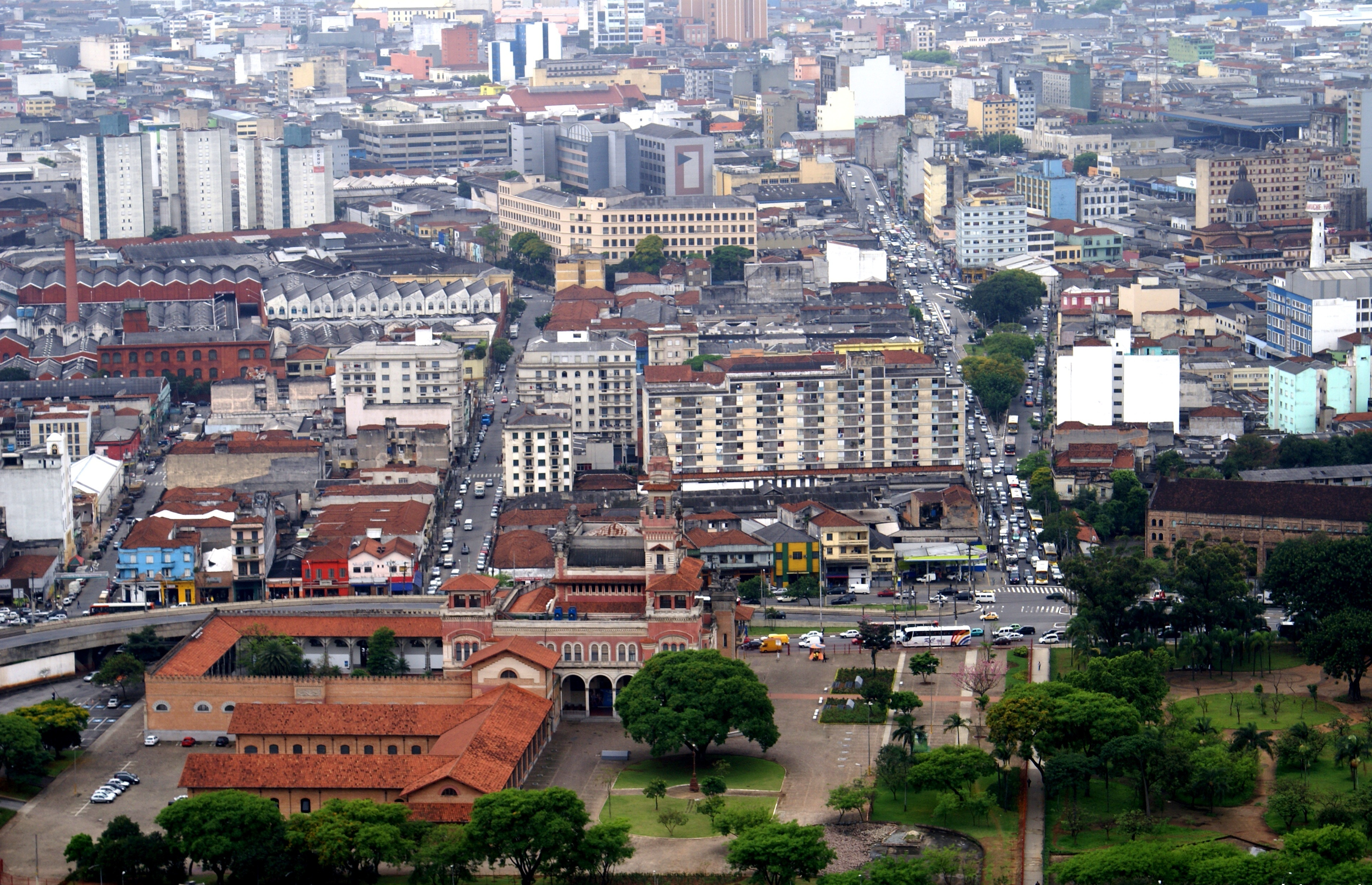 Palácio das Indústrias em São Paulo, Brasil. - Palácio das Indústrias (Palace of Industries) in São Paulo City, Brazil.